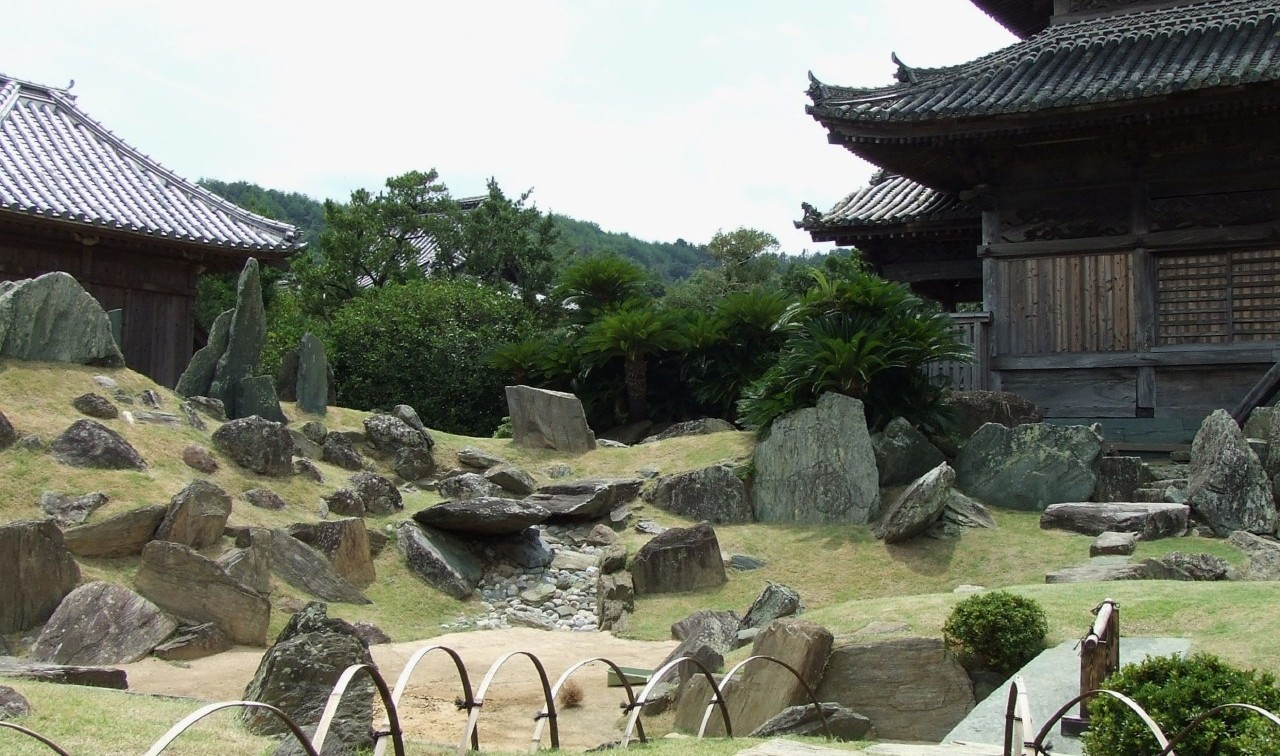 阿波国分寺の庭園